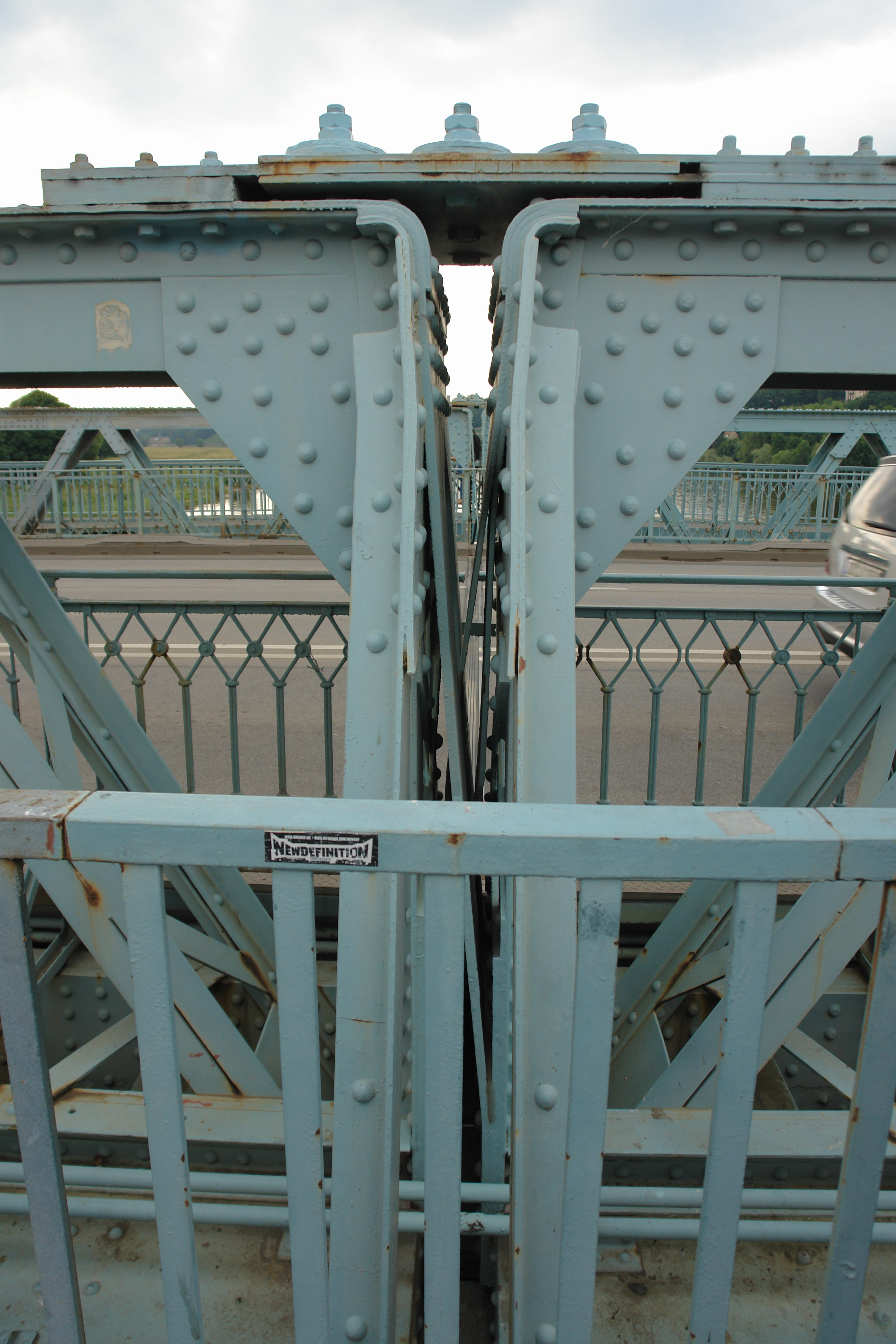 Die Brücke ²Blaues Wunder" in Dresden: Ausführung des Mittelgelenks als Federgelenk